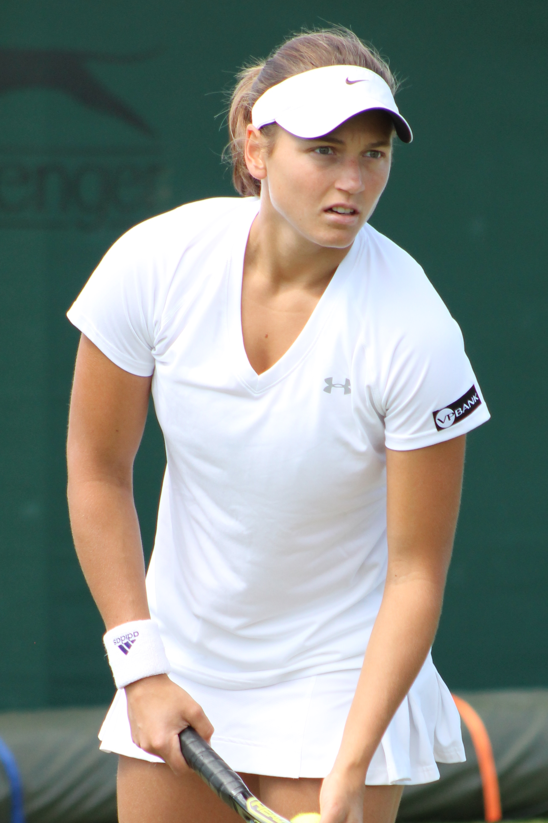 Vogt WMQ14 (9)